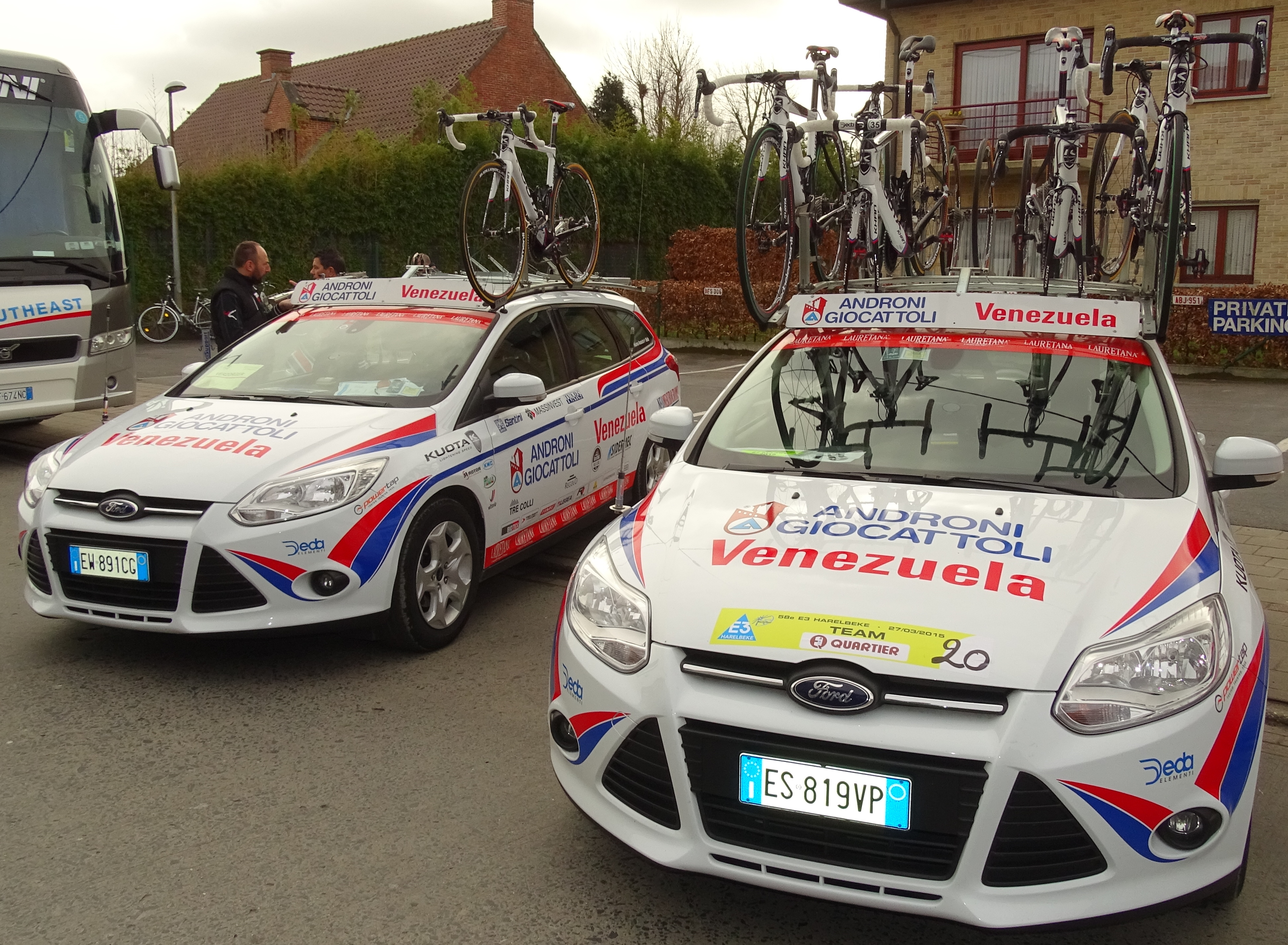 Reportage réalisé le vendredi 27 mars à l'occasion du départ et de l'arrivée du Grand Prix E3 2015 à Harelbeke, Belgique.